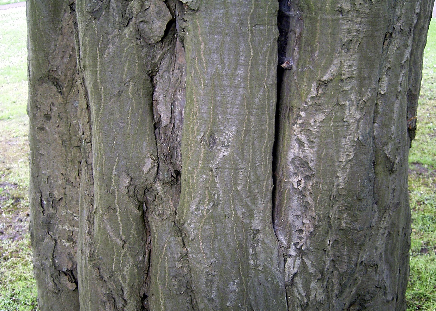 Hainbuchenrinde im Kurpark von Bad Nenndorf im Juni 2005